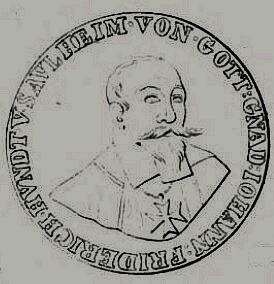 Schaumünze mit dem Bild des deutschen Johanniter Großpriors Johann Friedrich Hund von Saulheim